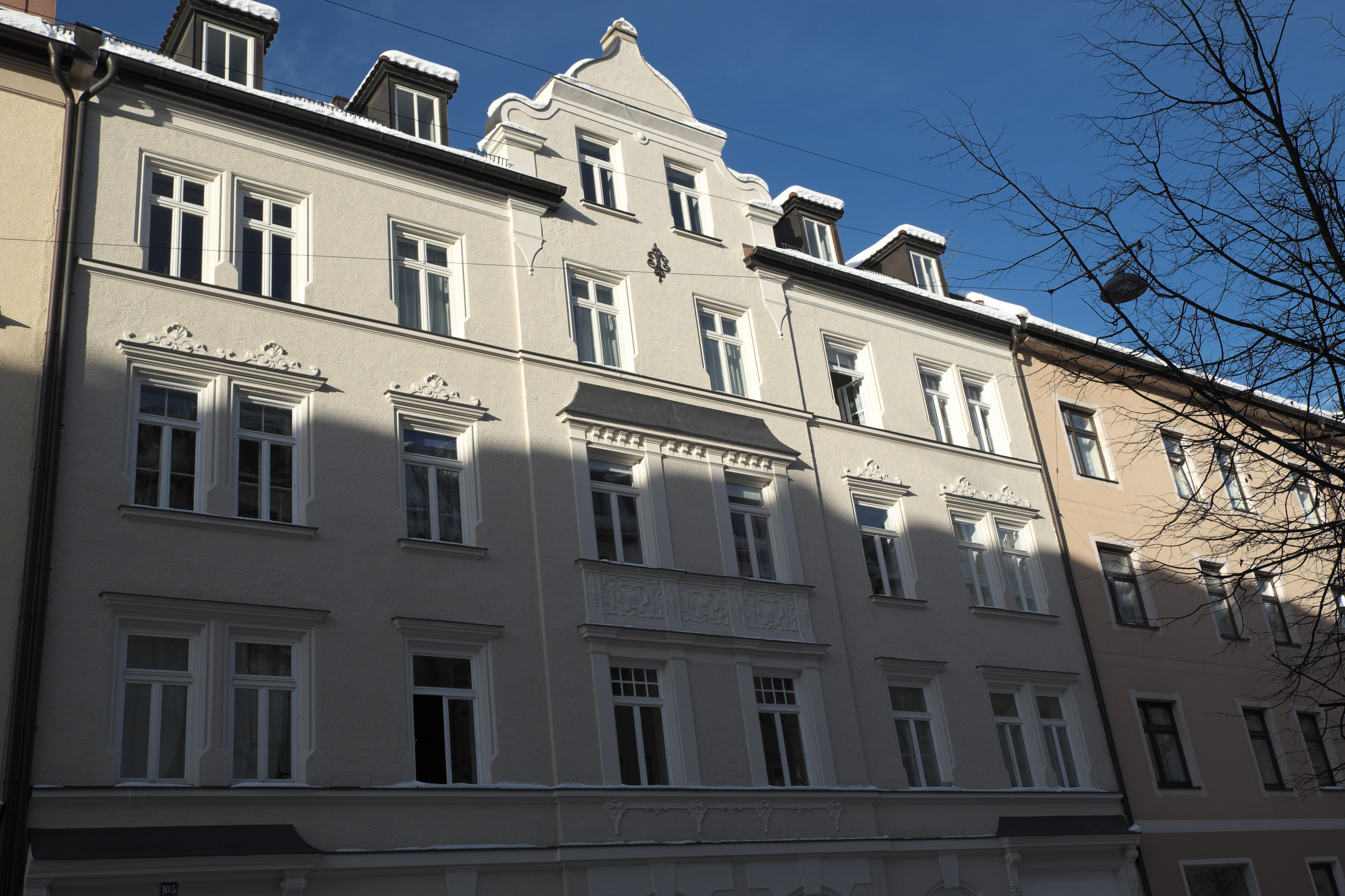 Mietshaus in der Belfortstraße 5 in Haidhausen im Stadtbezirk Au-Haidhausen in München (Bayern/Deutschland), um 1890/1900